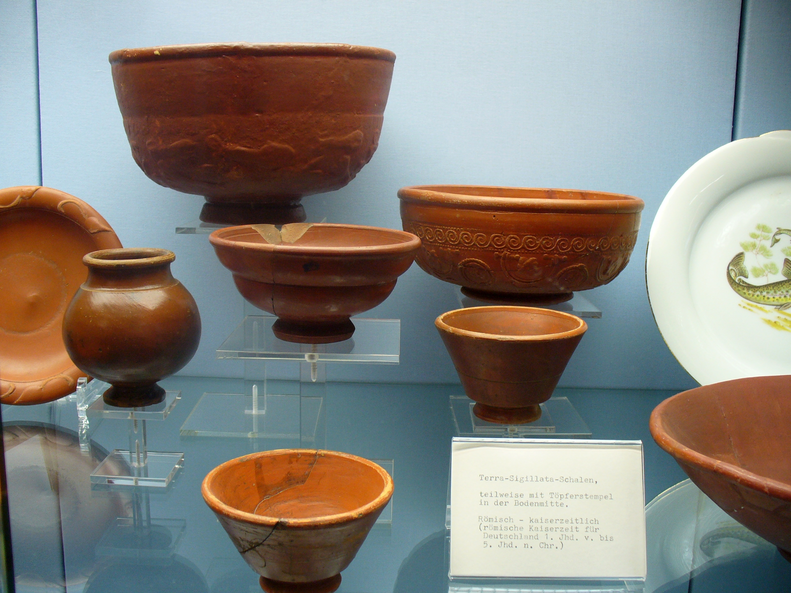 Terra sigillata-Gefäße; 2.-3. Jahrhundert n. Chr.; vorne links neben der Beschriftung sowie darüber zwei Näpfe Dragendorff 33, ganz links ein Becher Ludowici Vd/ Niederbieber 24a/ Dragendorff 54, dahinter ein Teller Drag. 36; in der Bildmitte Napf Drag. 27, im Hintergrund zwei Bilderschüsseln Drag. 37; Vor- und Frühgeschichtliche Sammlung im Wallenfels'schen Haus in Gießen